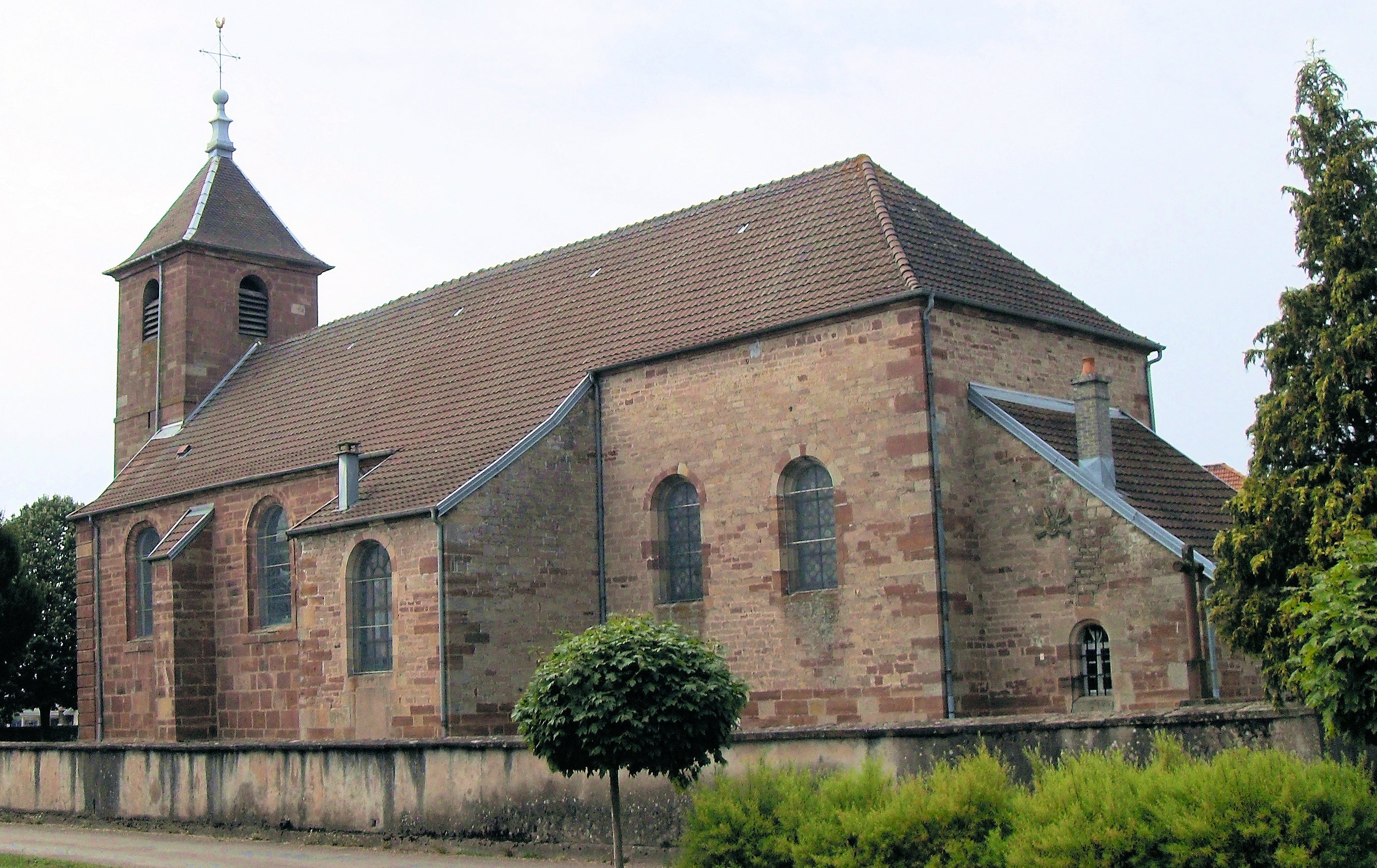 L'église Saint-Hippolyte à Roye